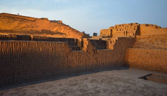 La Huaca Pucllana de noche